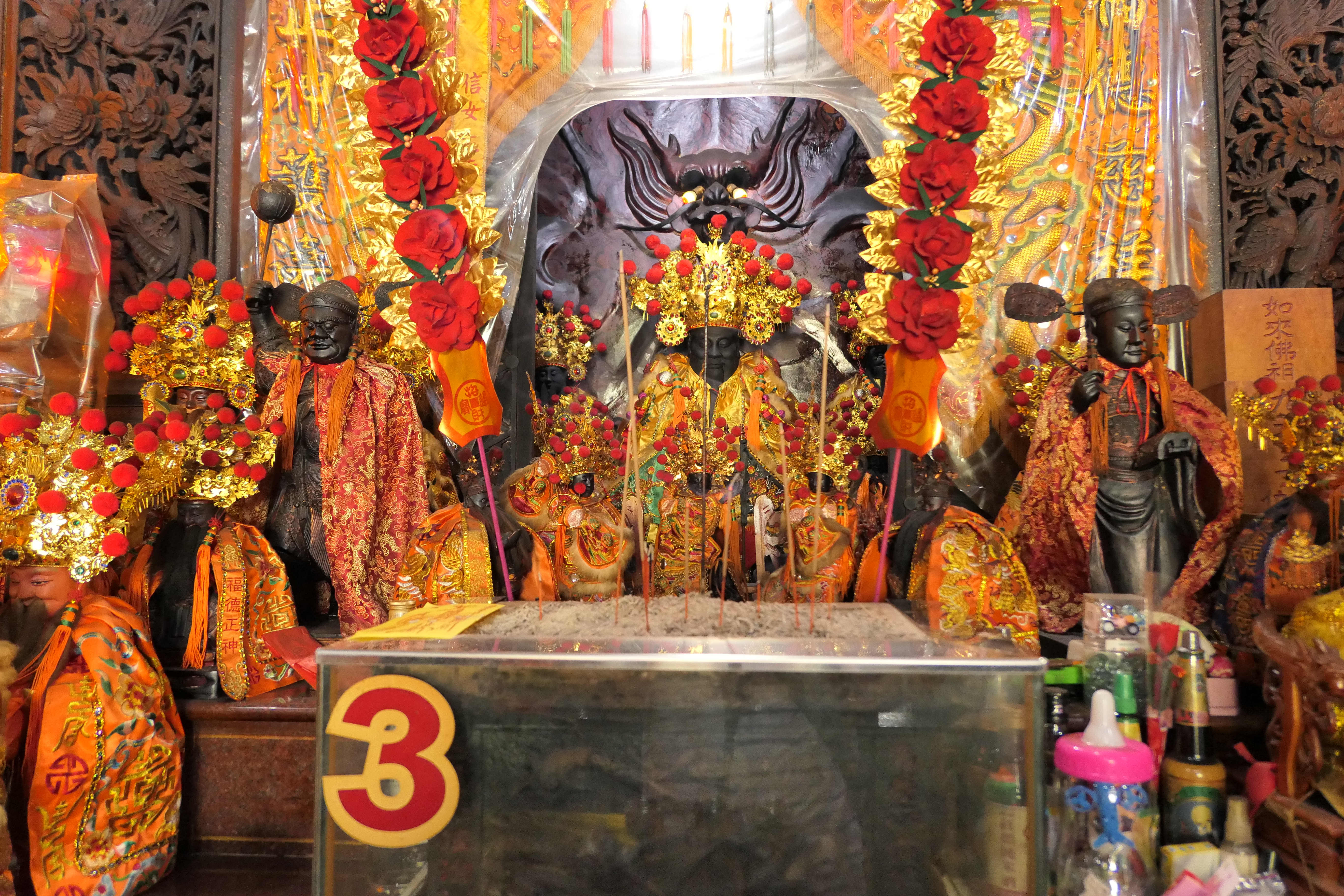 中文（台灣）: 福社宮神像與嘉慶時的古香爐